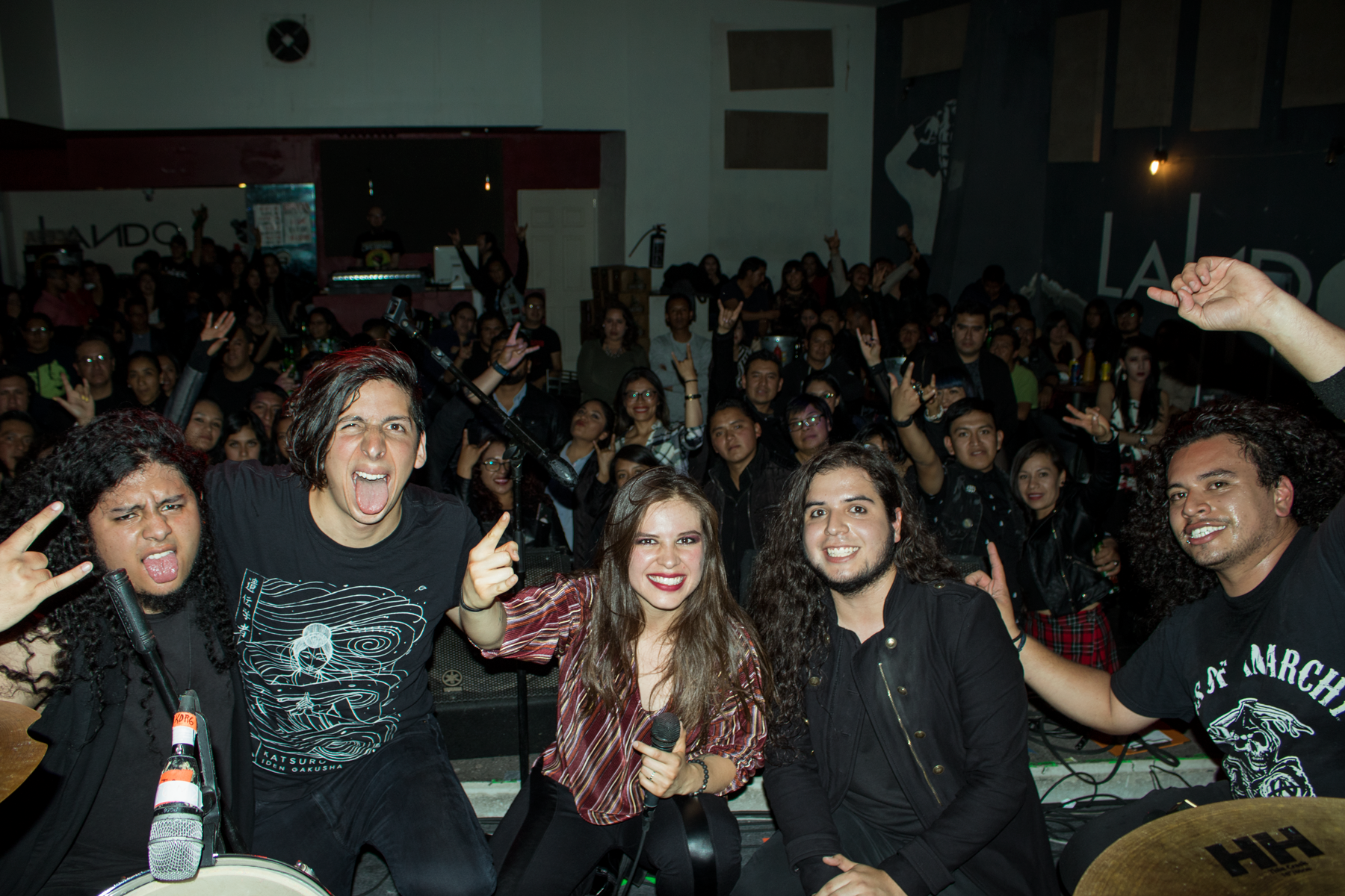 Velvet Darkness en el foro Landó en Toluca, Estado de México.